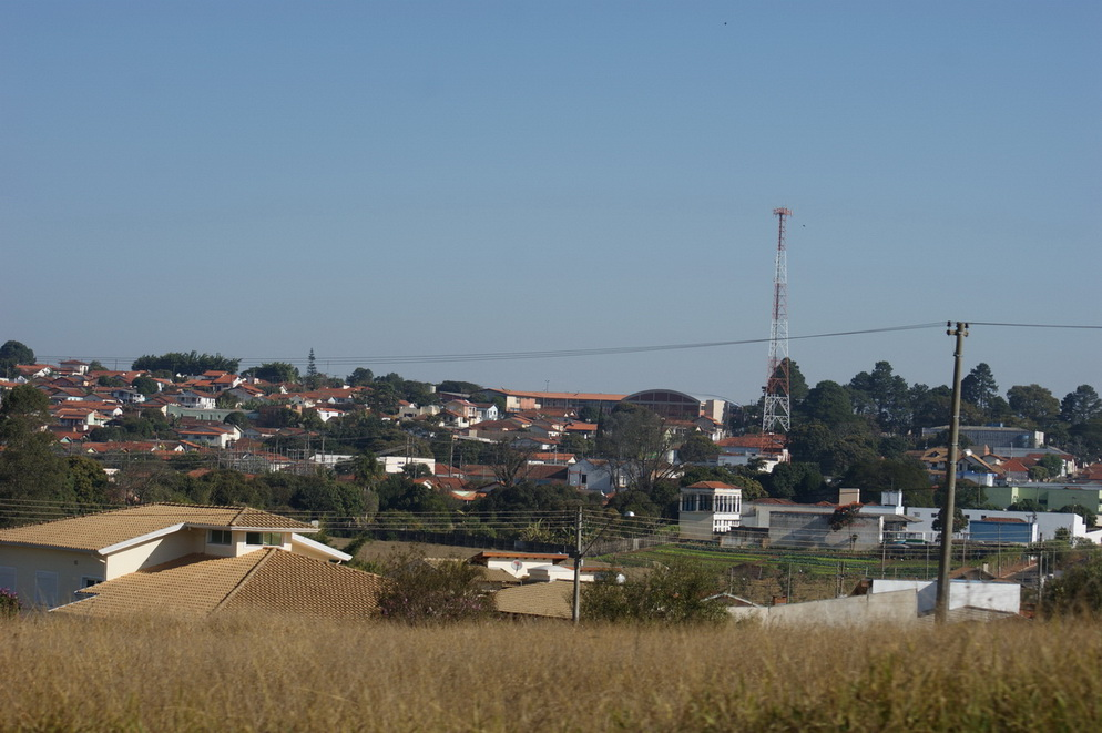 Imagem do município de Cerqueira César, estado de São Paulo, Brasil.